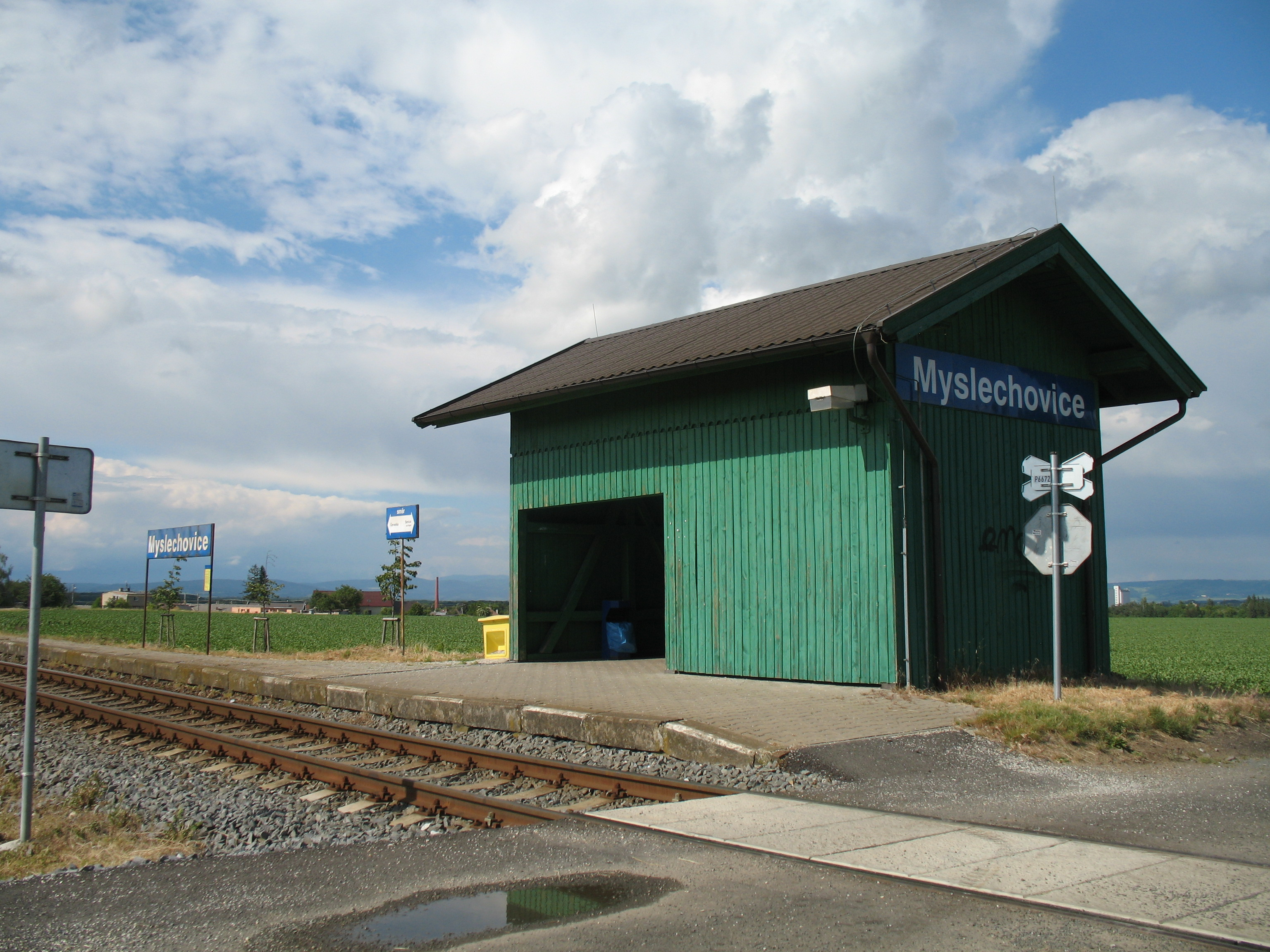 Myslechovice na trati č. 273